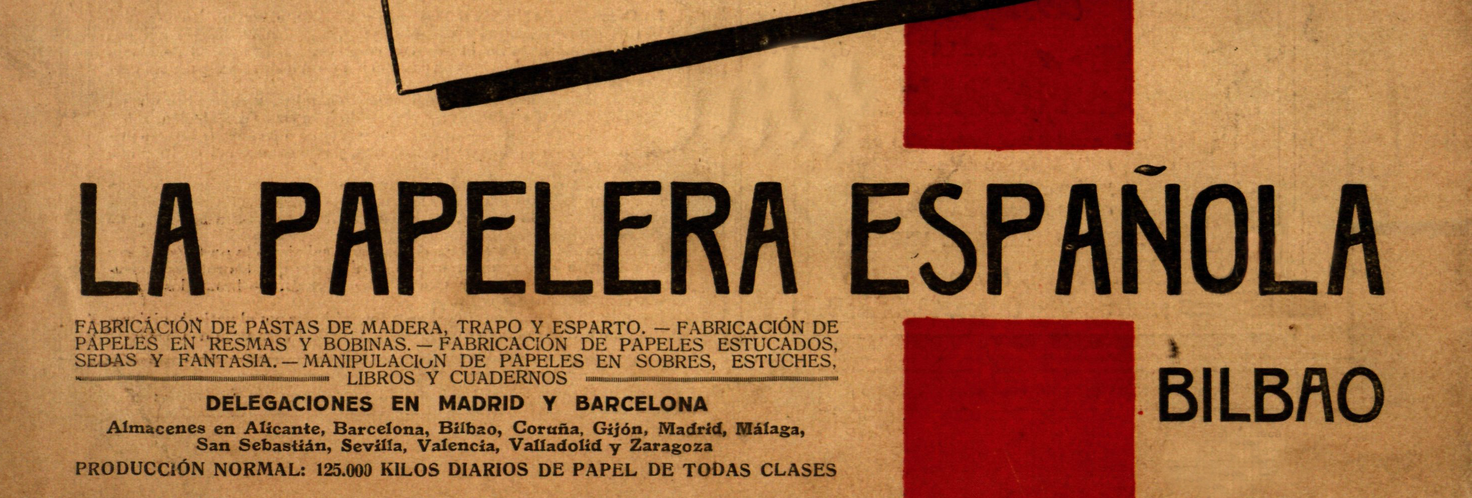 La Papelera Española.